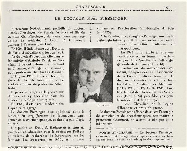 Le Docteur Noël Fiessinger Revue : Chanteclair, 21e année Edition : Romainville : Carnine Lefrancq, 1926